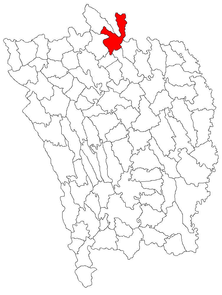 Categorie:Hărţi ale judeţului Vaslui